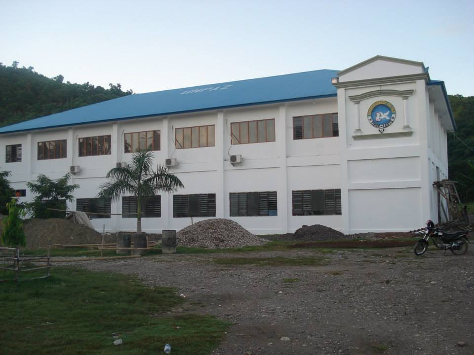 Dili